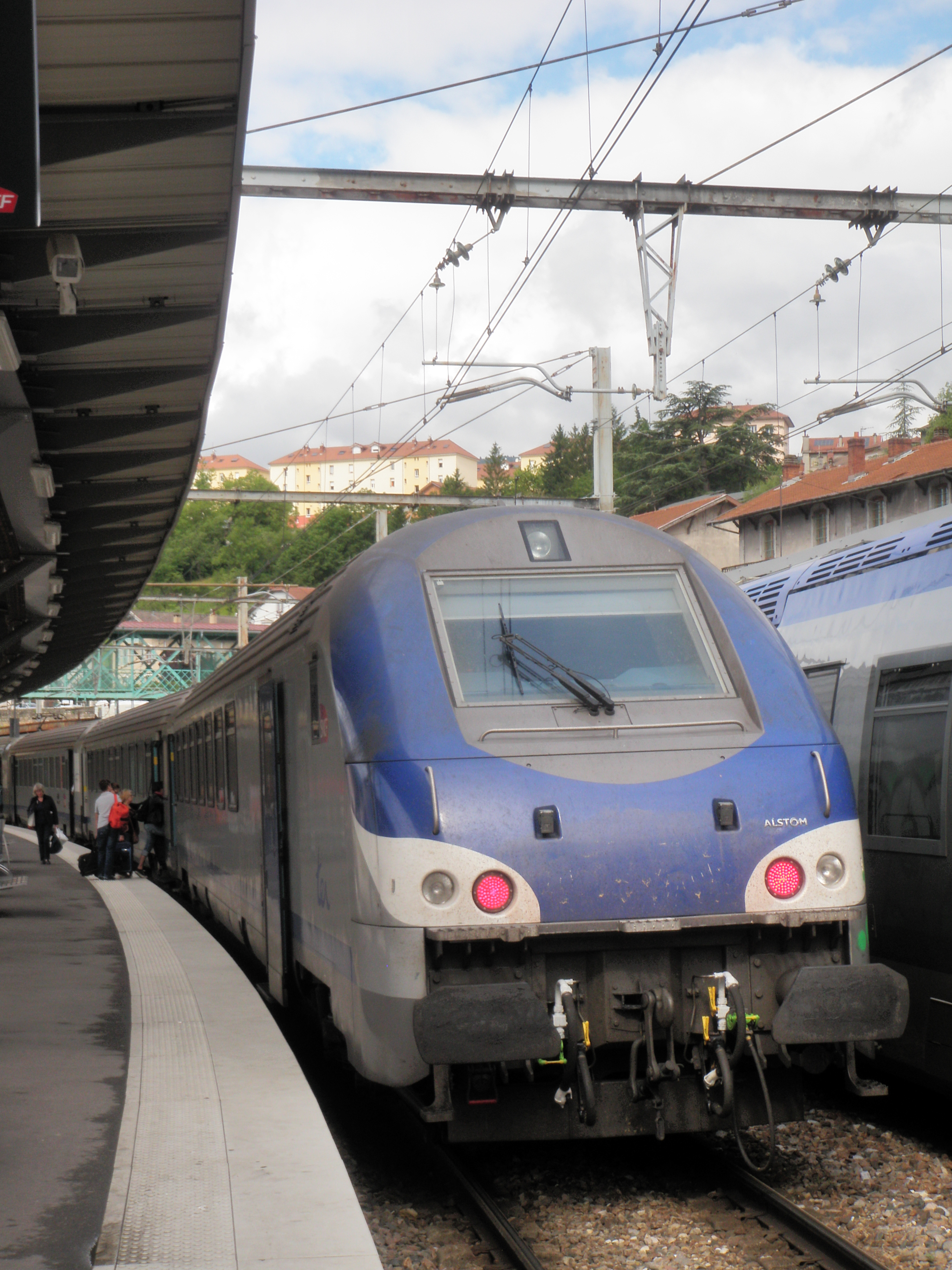 Voiture pilote B5uxh en gare de Bellegarde